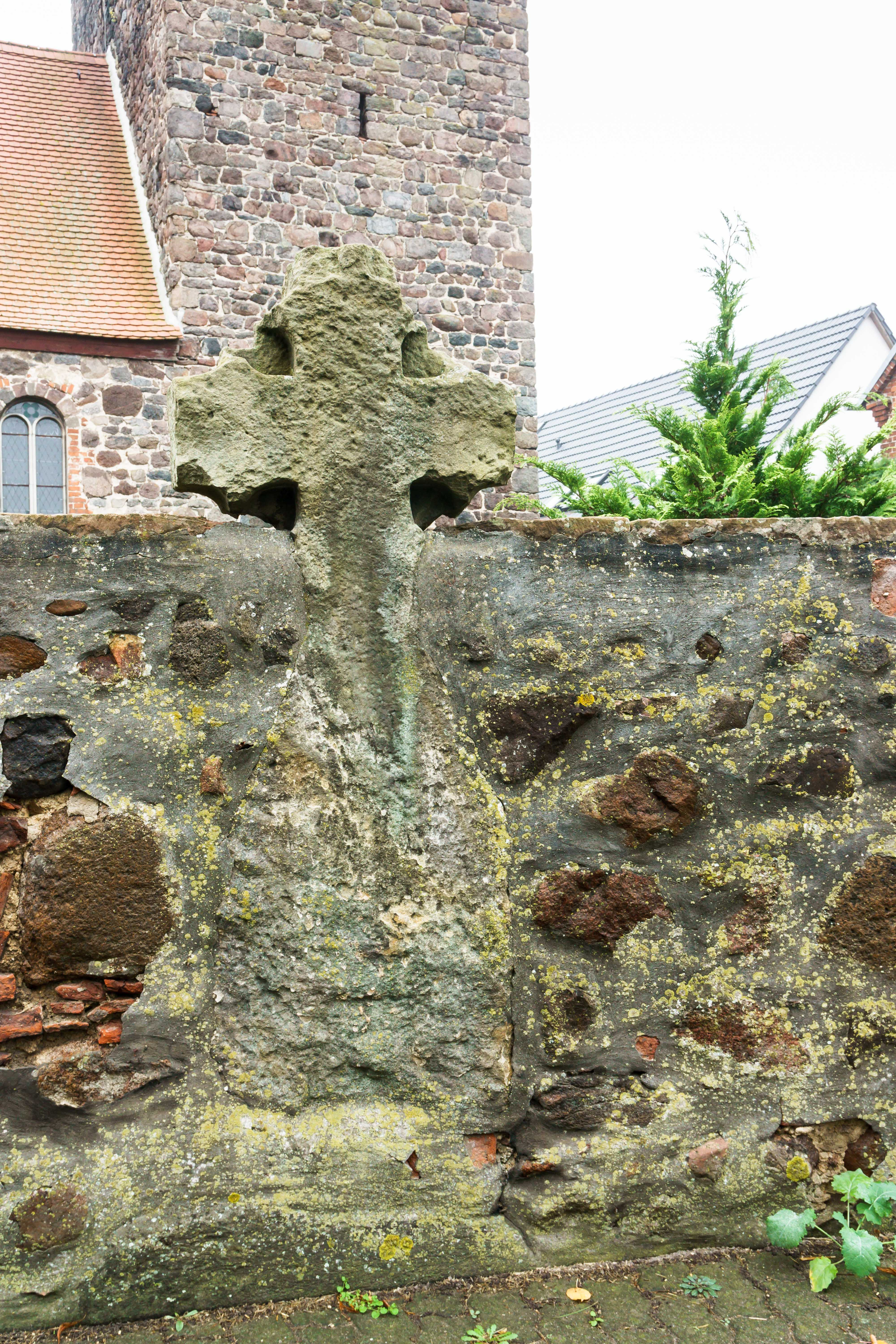 Gotisches Kreuz, teilweise eingemauert in der Kirchhofsmauer von Klein Schwechten